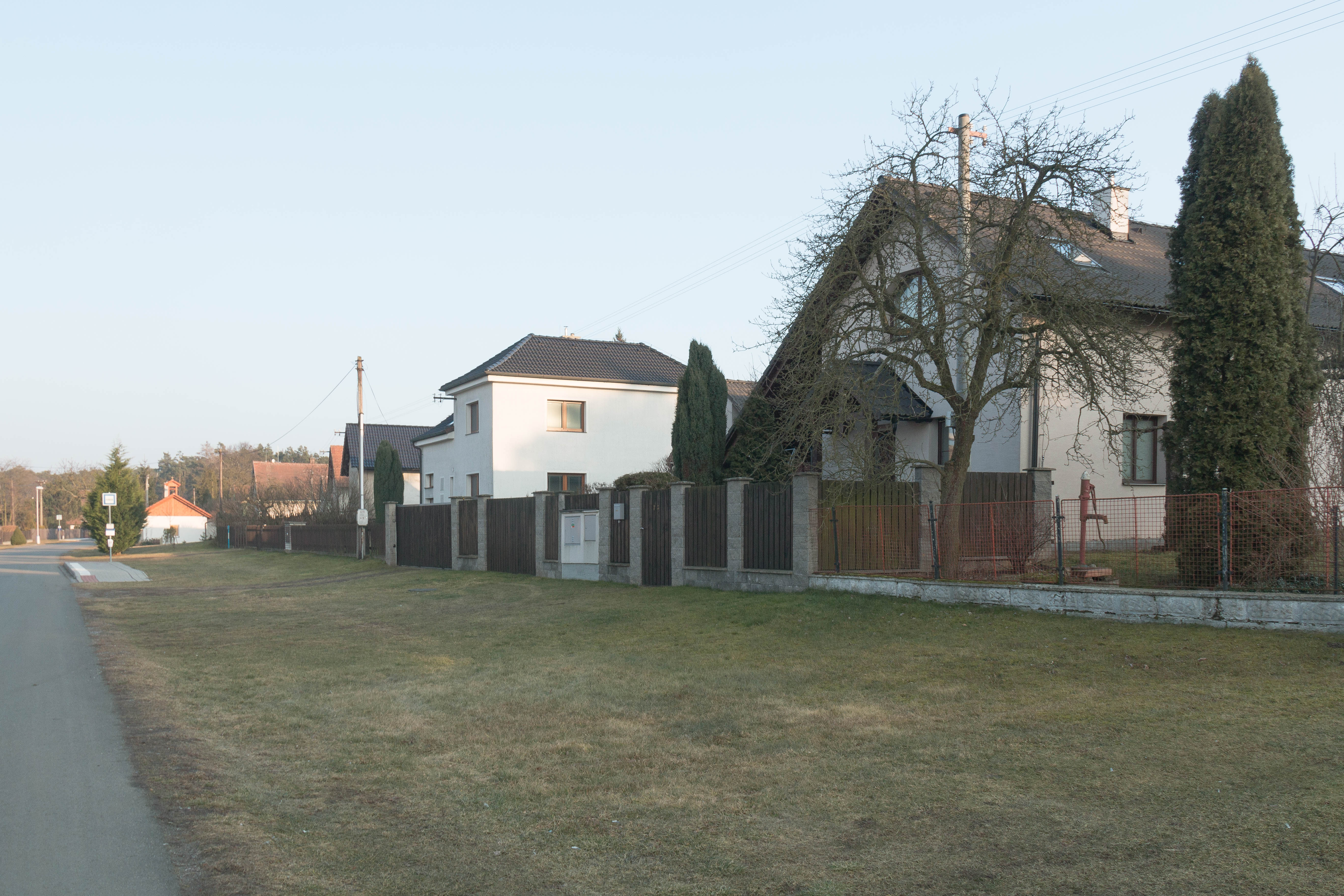 Dědek čp. 74